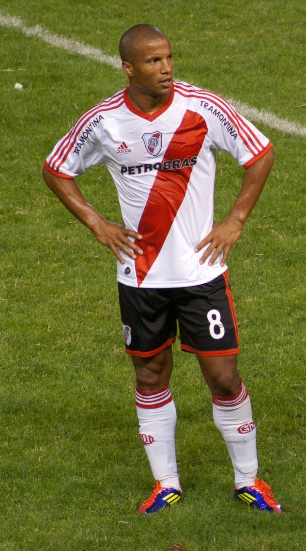 Carlos Sánchez, jugador profesional uruguayo.